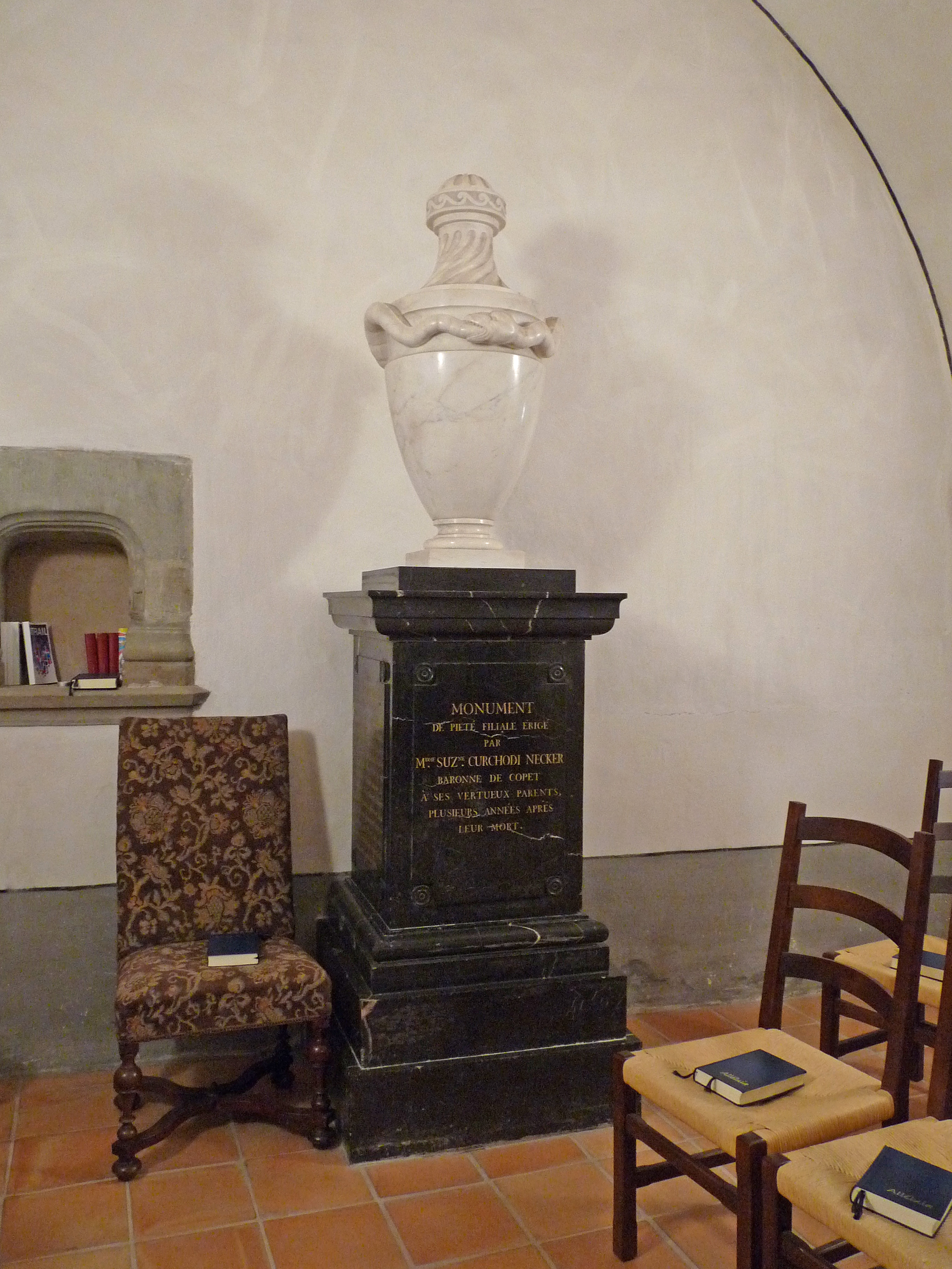 Temple de Coppet (Eglise évangélique réformée du canton de Vaud, Suisse)